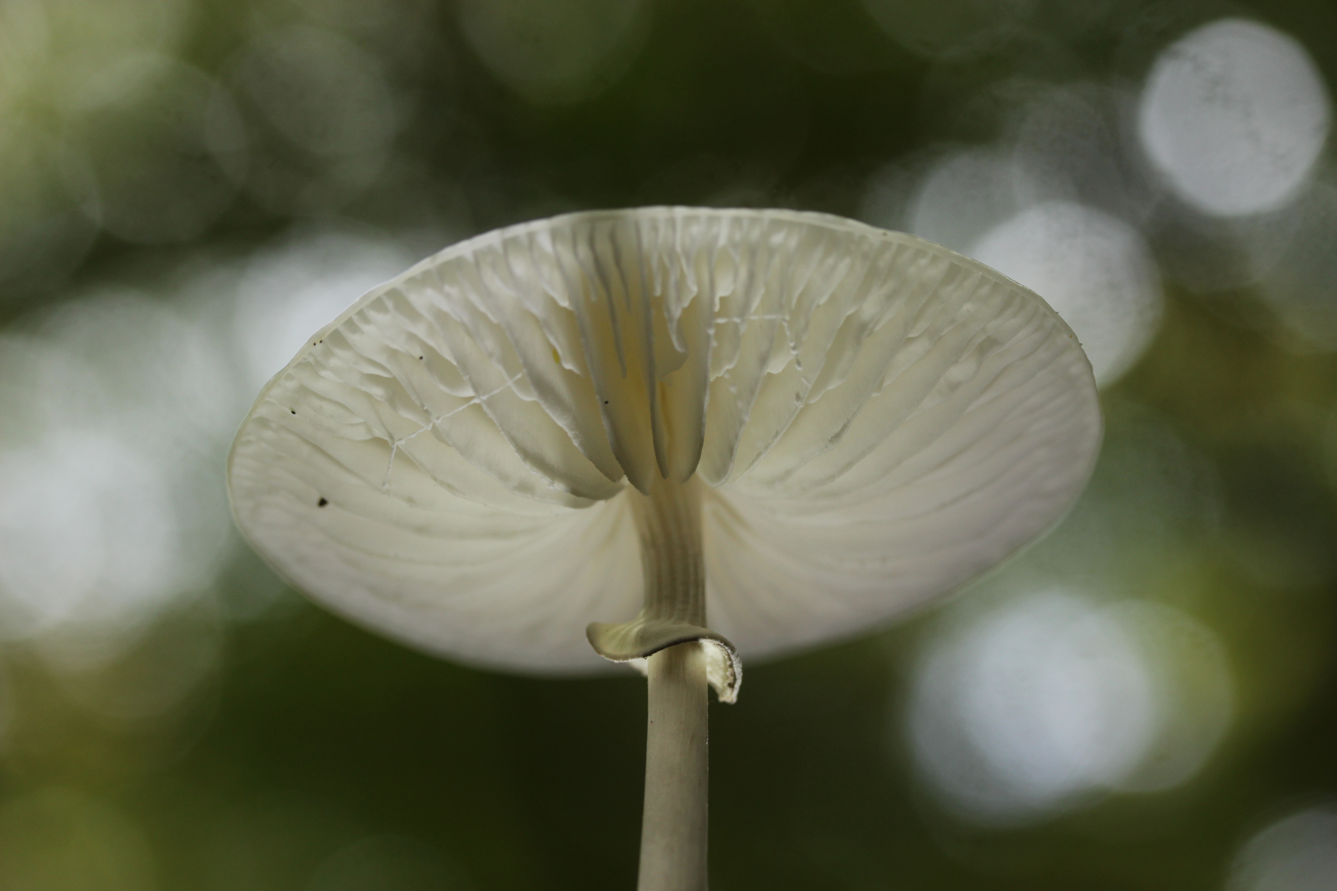 Porcelain Fungus - Oudemansiella mucida